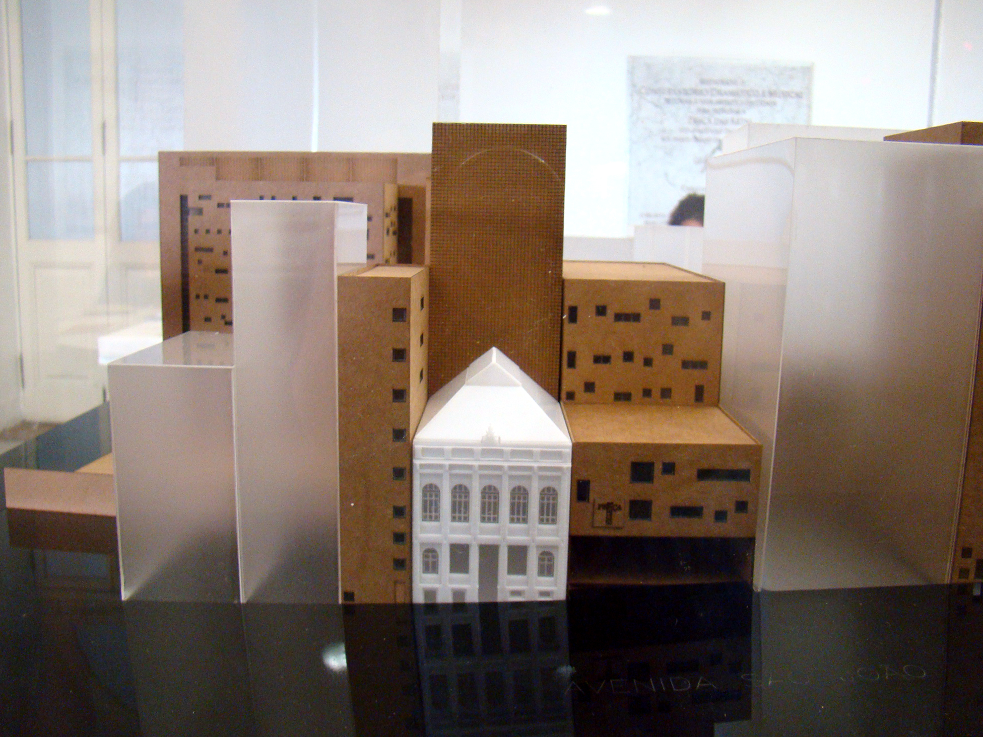 Maquete do complexo cultural Praça das Artes, construído ao redor do Conservatório Dramático e Musical de São Paulo, representado em branco